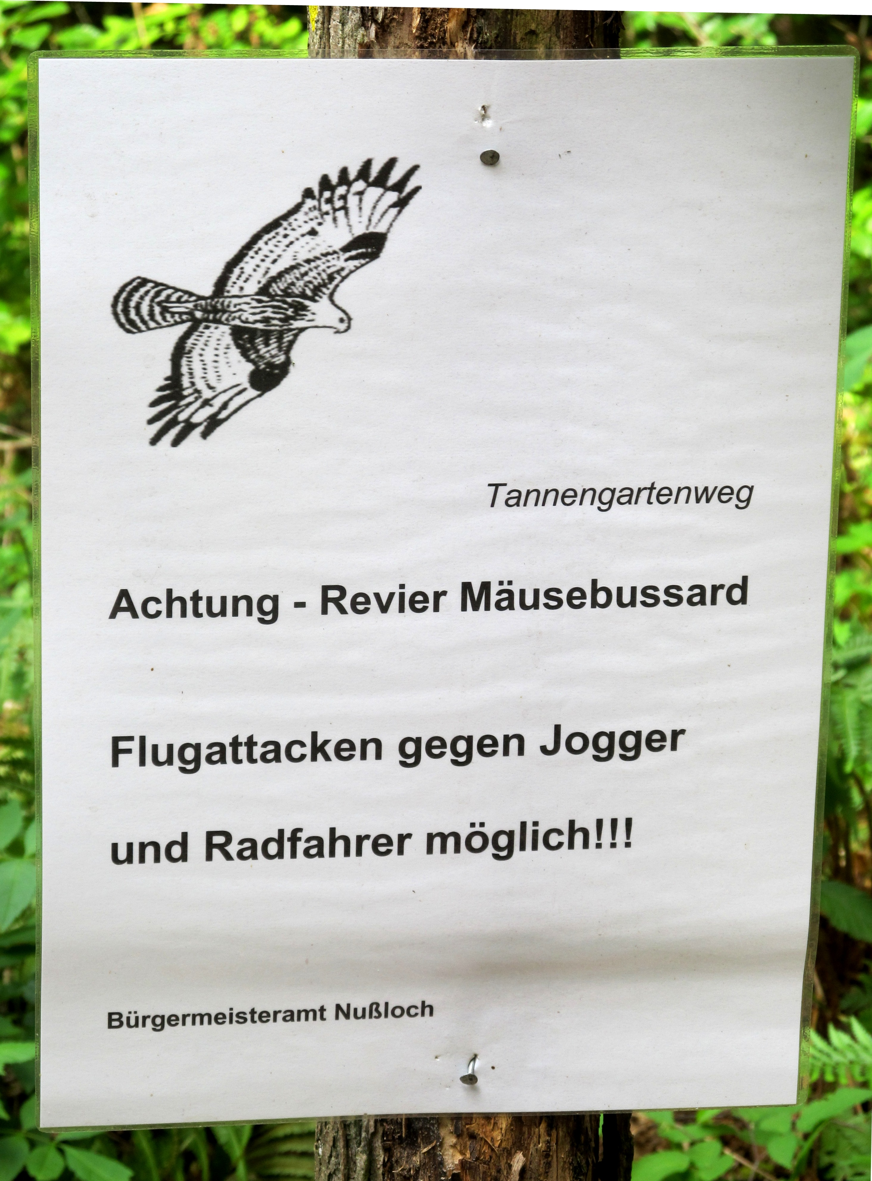 Hinweis für Jogger und Radfahrer im Nußlocher Gemeindewald